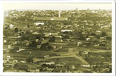 Imagem Jacuba do século XIX.